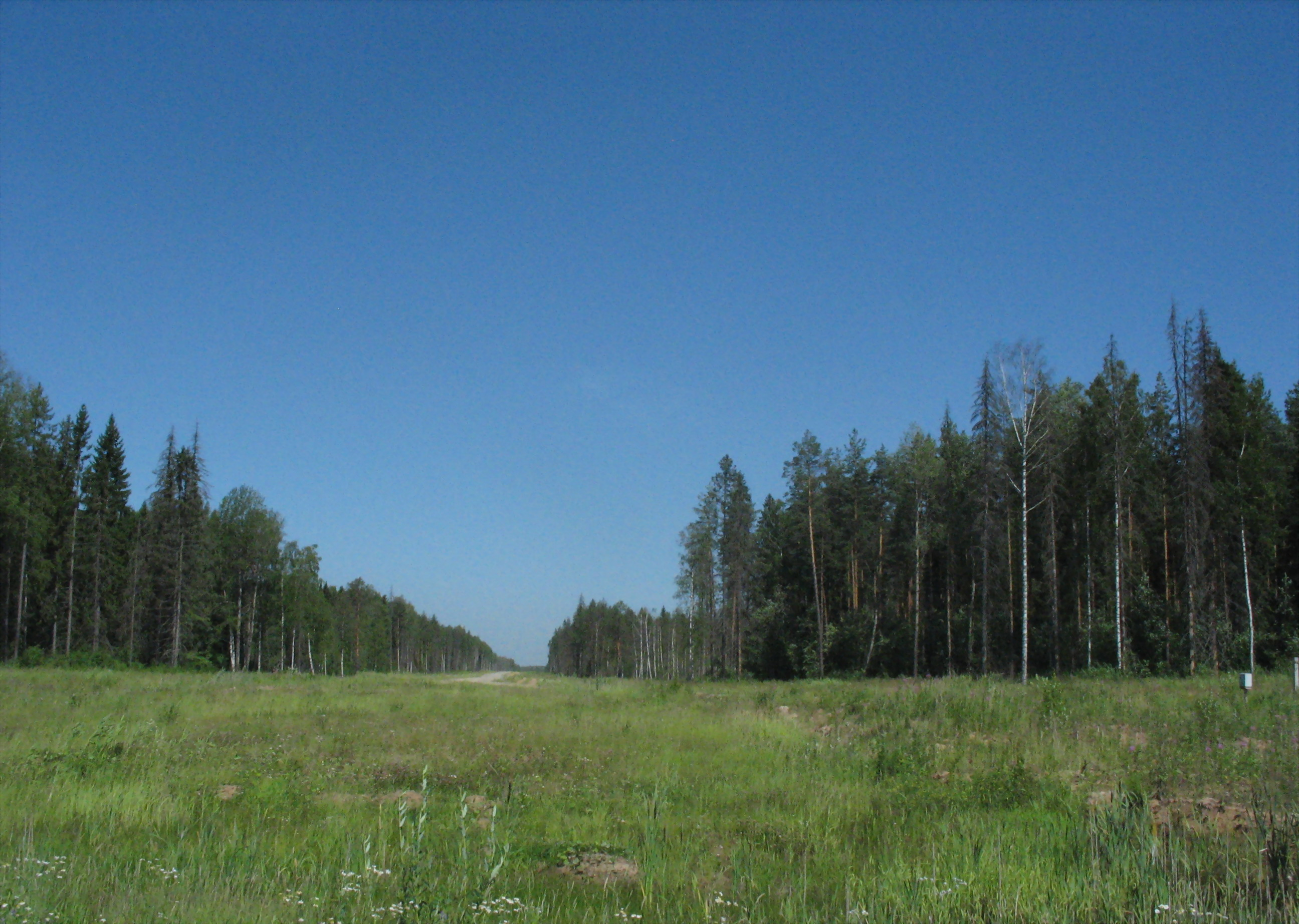 Просека под трассу на Островское